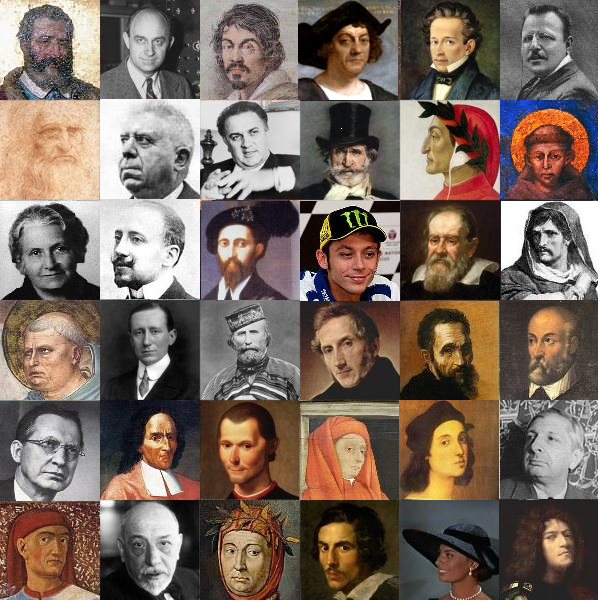 Mosaico di 36 italiani che hanno avuto un ruolo fondamentale nella storia delle arti e delle scienze